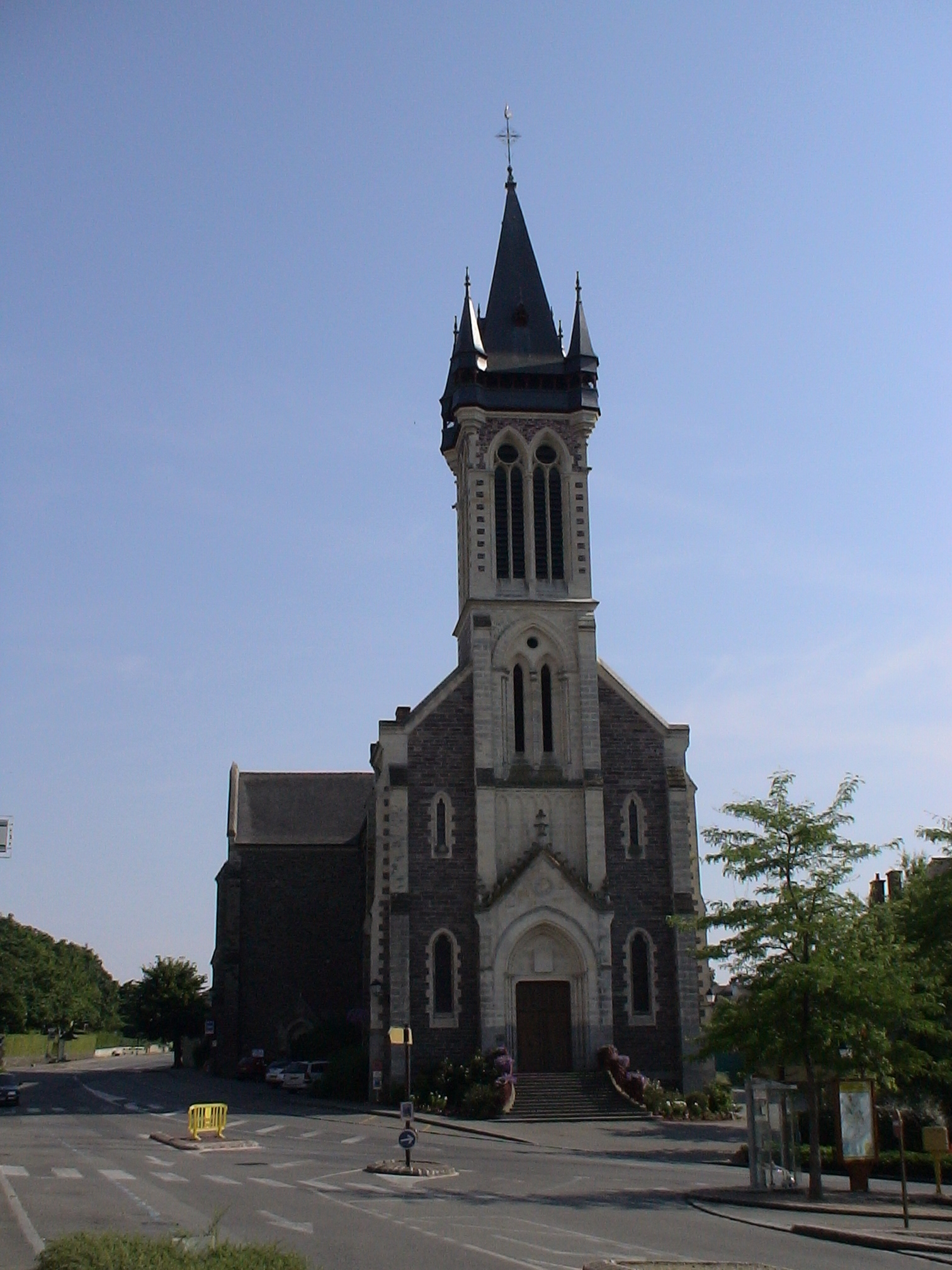 L'église paroissiale Sainte-Madeleine de Châteaugiron.